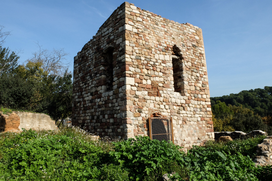 Torre de Ca N'Altimira, a la comarca del Vallès Occidental, Catalunya